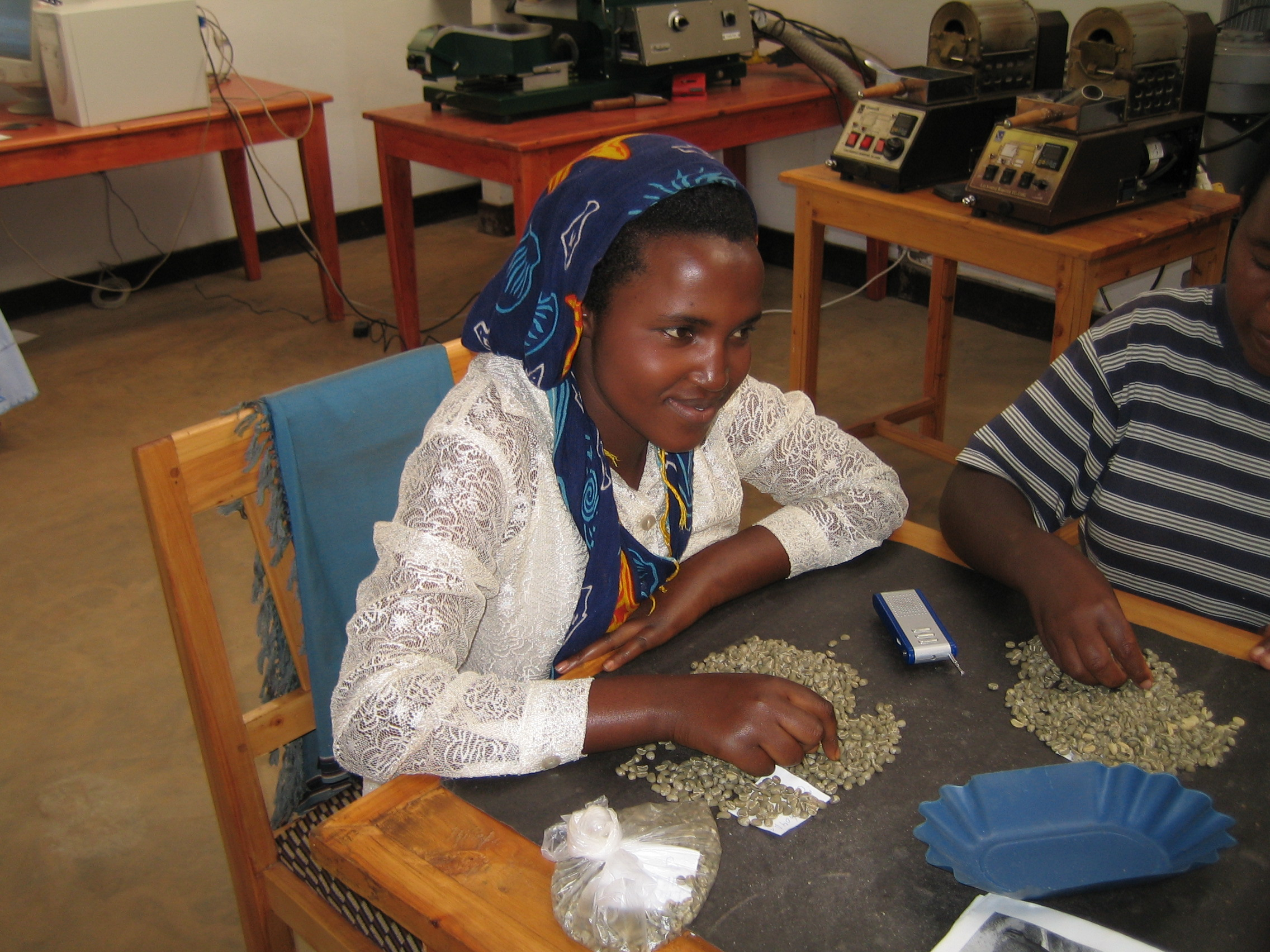 Taken by SteveRwanda